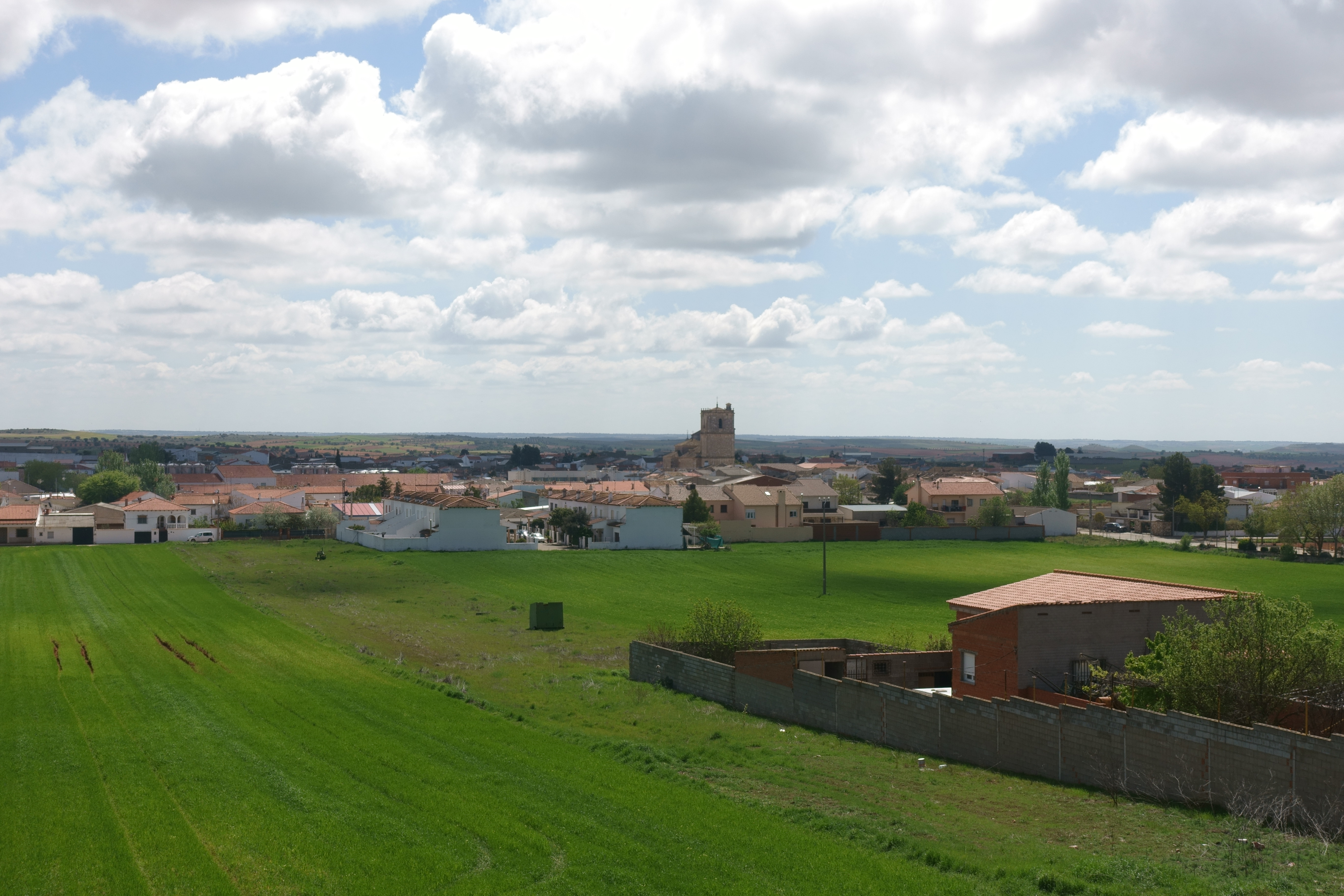 Vista general de Los Hinojosos (Cuenca, España).